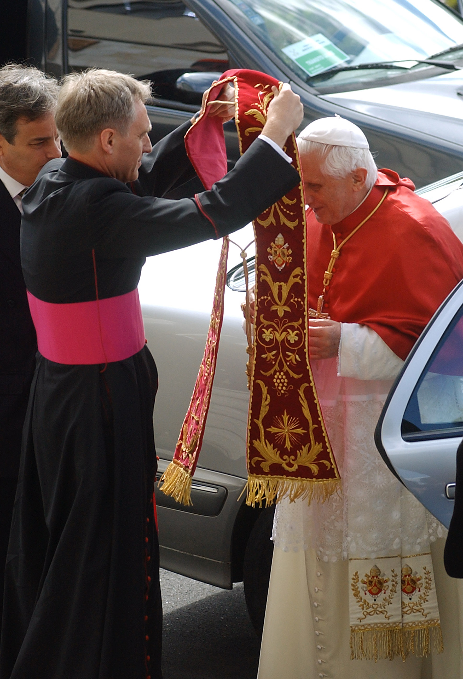 Papa Bento XVI chega ao Palácio dos Bandeirantes, residência oficial do governador do estado de São Paulo.